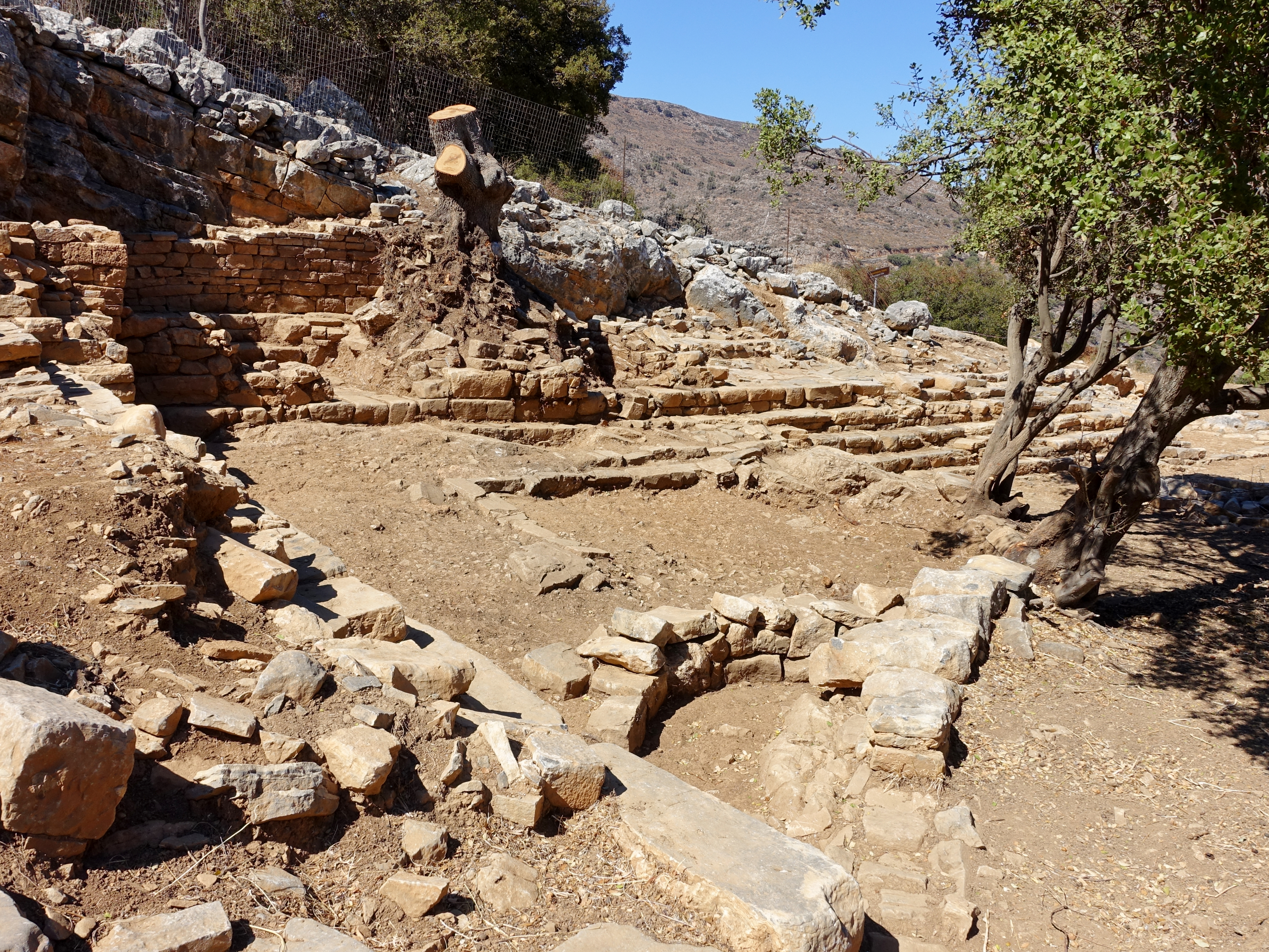 Ausgrabungsstätte von Dreros (Δρῆρος), Gemeinde Agios Nikolaos, Kreta, Griechenland